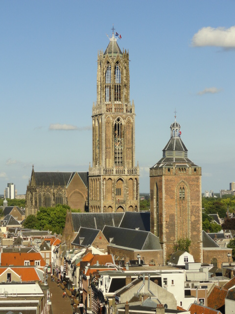 Dom- en Buurkerktoren, Utrechts trots!